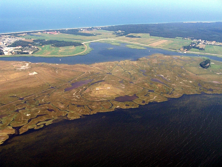 Luftbildaufnahme der Insel Kirr